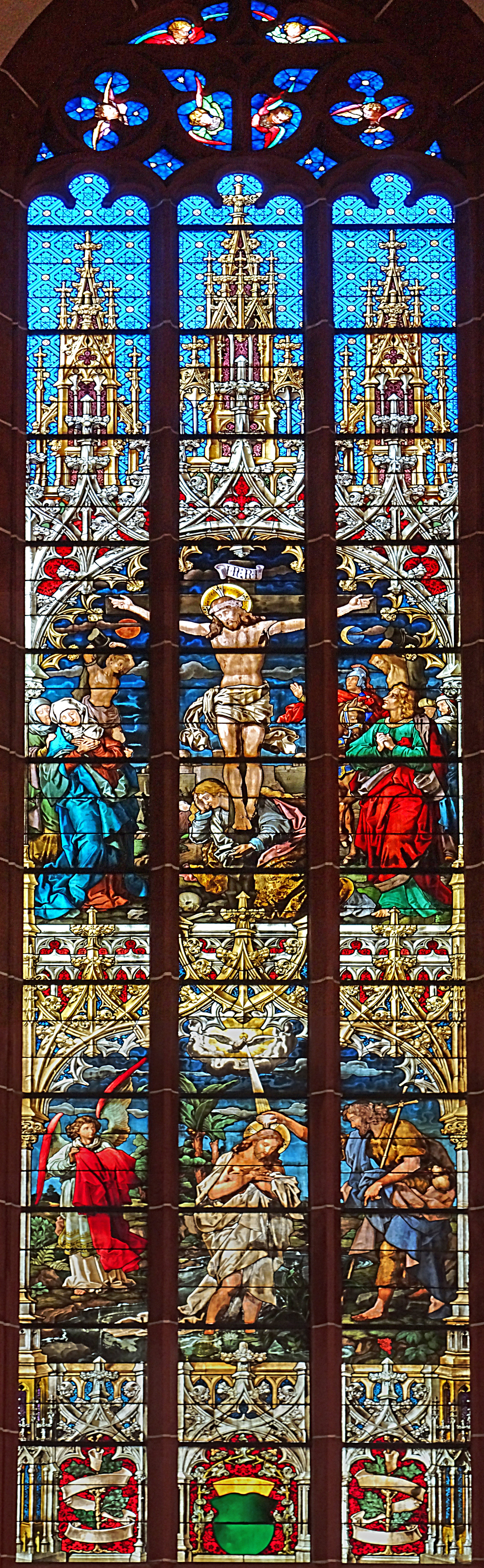 mittleres Chorfenster - unten Johannistag, oben Karfreitag - in der Johanneskirche Saalfeld